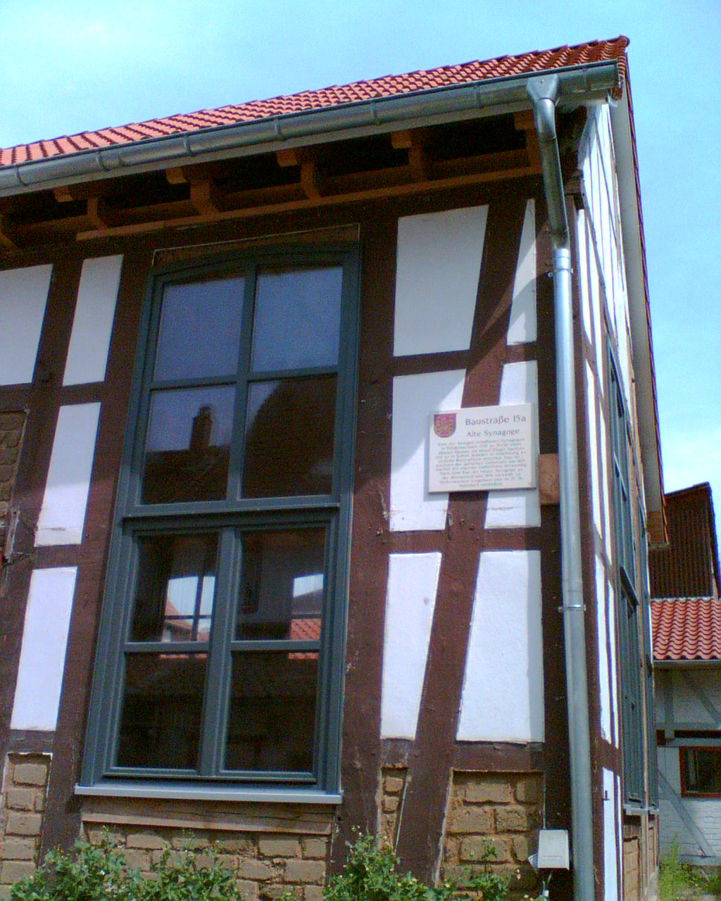 Sinagoga di Einbeck